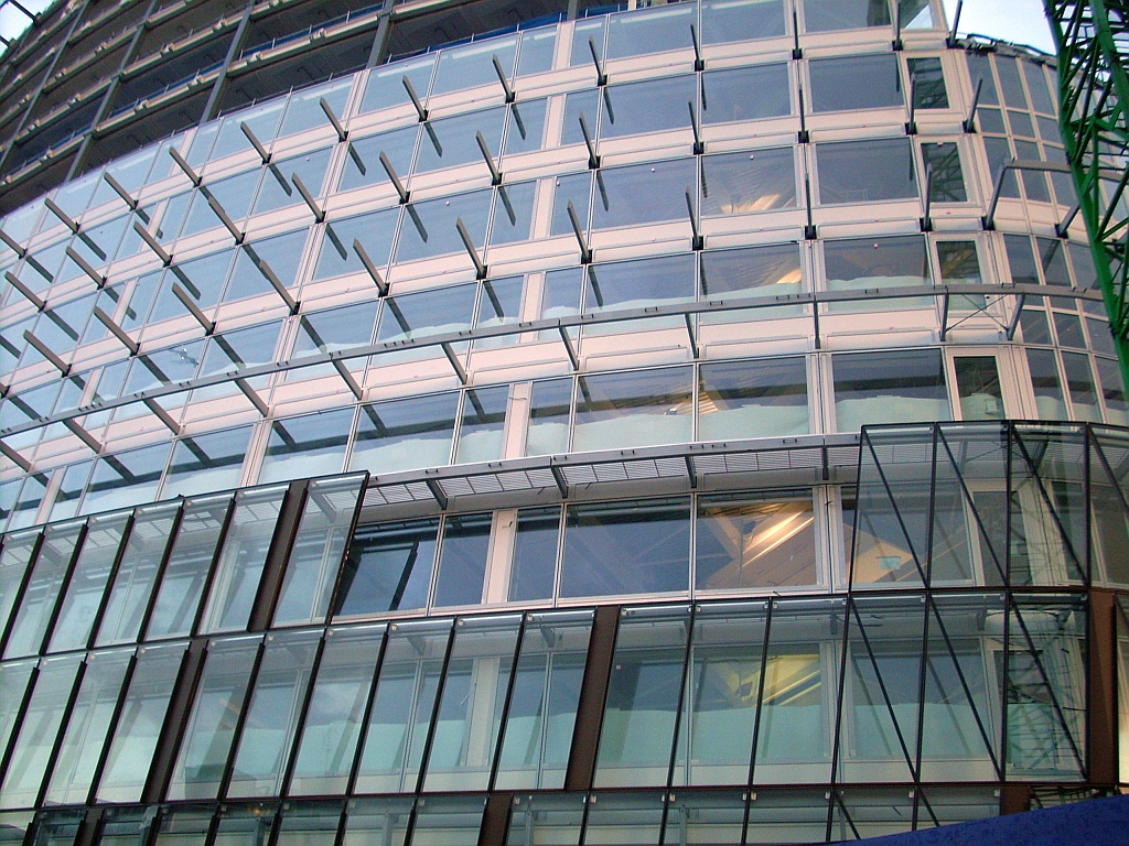 Gantry